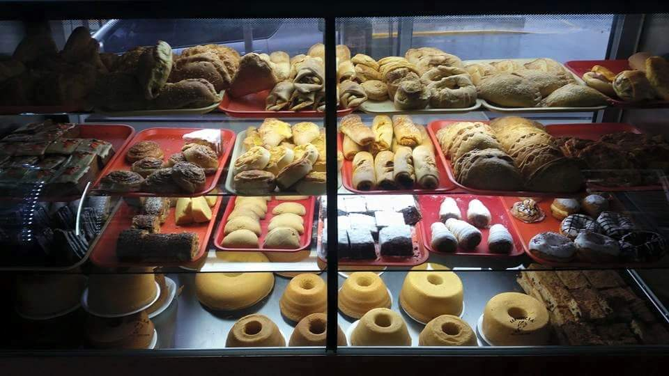 Urna de repostería costarricense